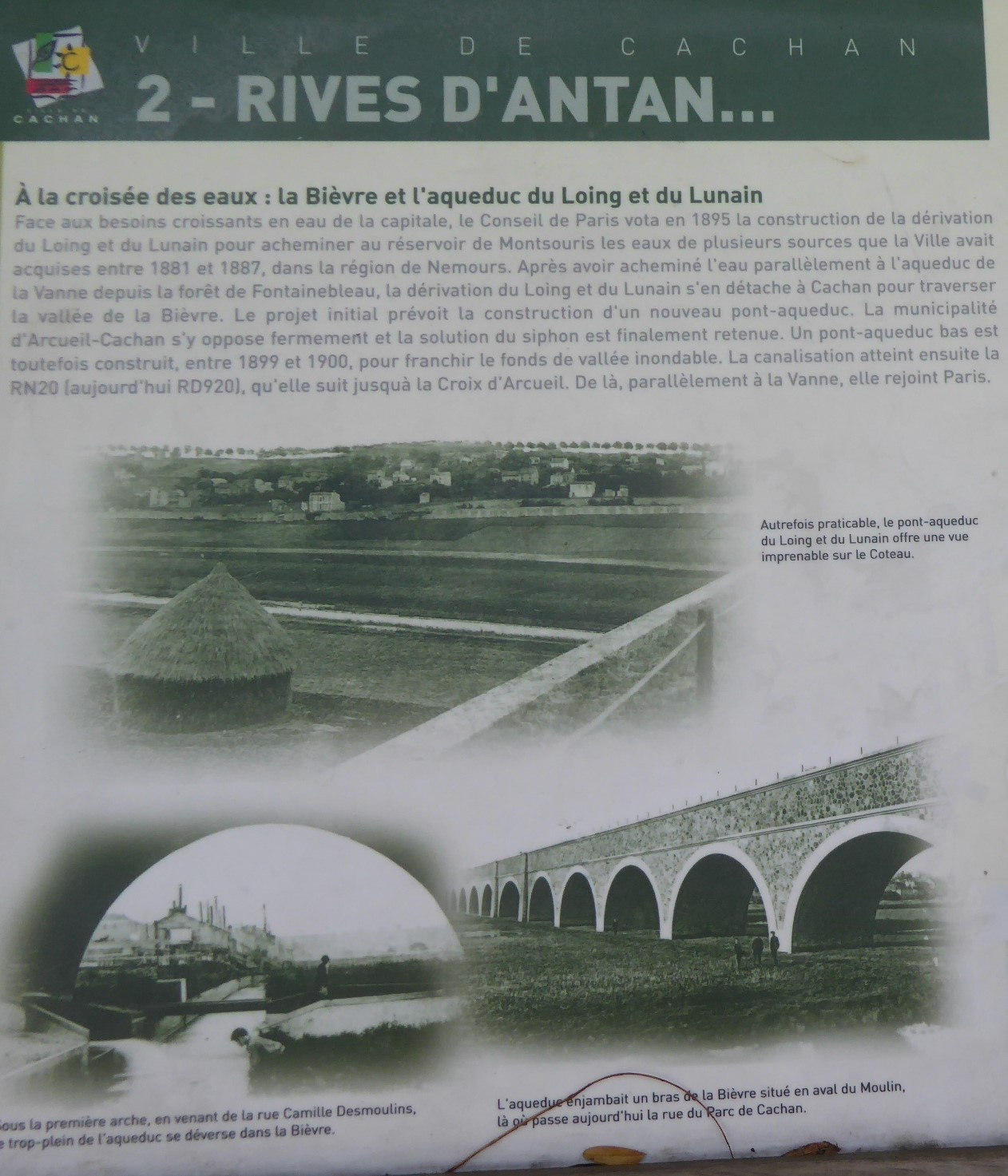 Cachan panneau d'information Bièvre aqueducs